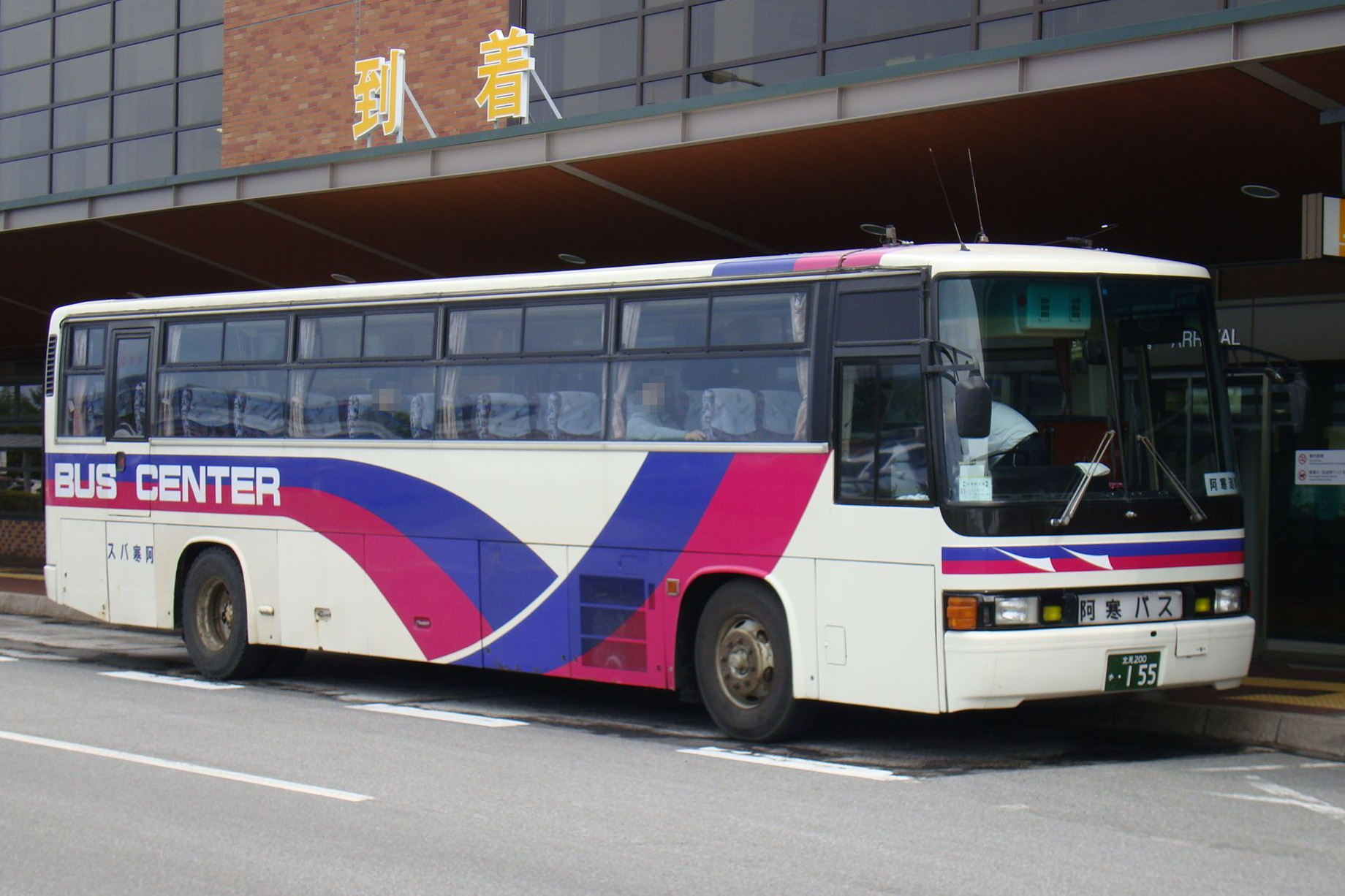 阿寒パノラマコース